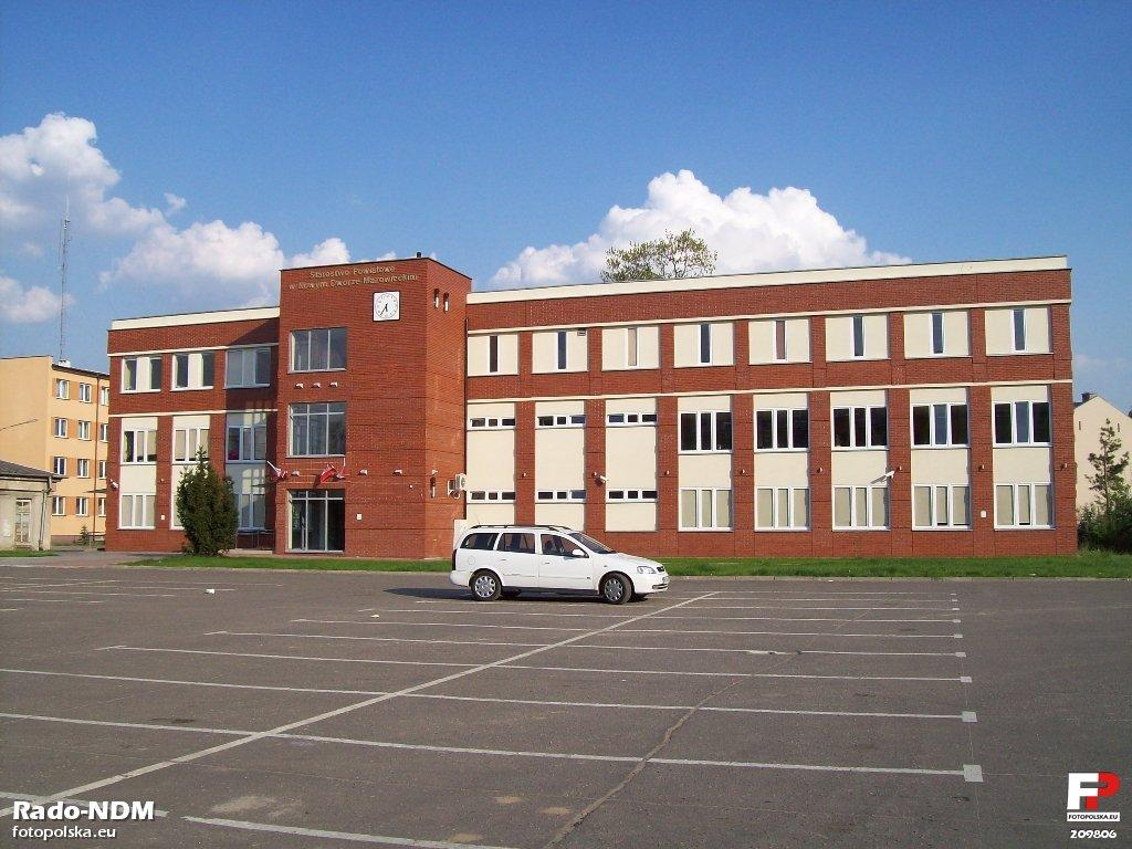 Nowy biurowiec Starostwa Powiatowego przy ul. Paderewskiego 1b